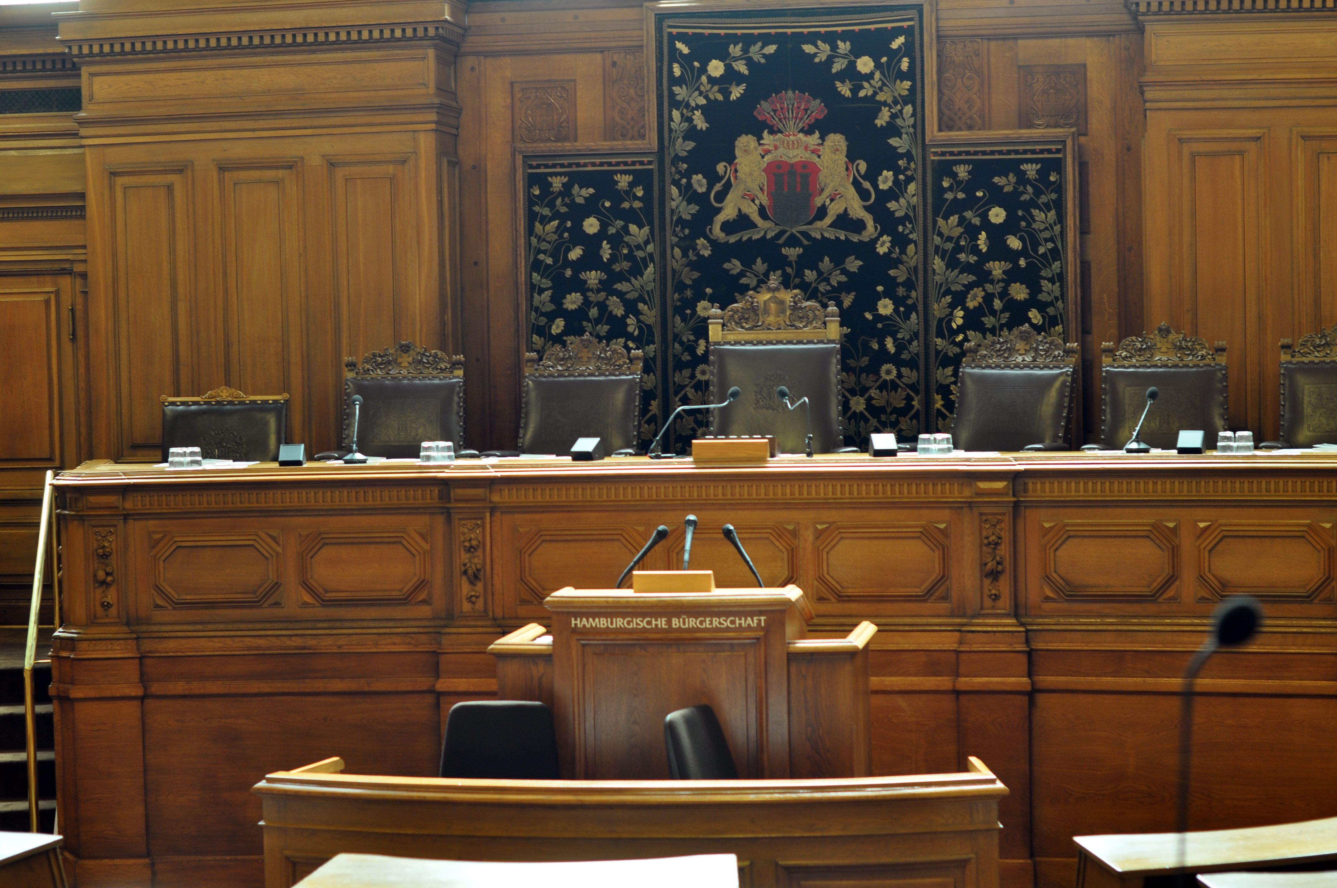 WikiProjekt Hamburgische Bürgerschaft. Hier der Präsidiumstisch mit den üppig verzierten Stühlen und dem Wandteppich mit dem Großen Staatswappen. Davor steht das Rednerpult. 22./23. 6. 2011 Fotos aus dem Rathaus This is a photograph of an architectural monument.